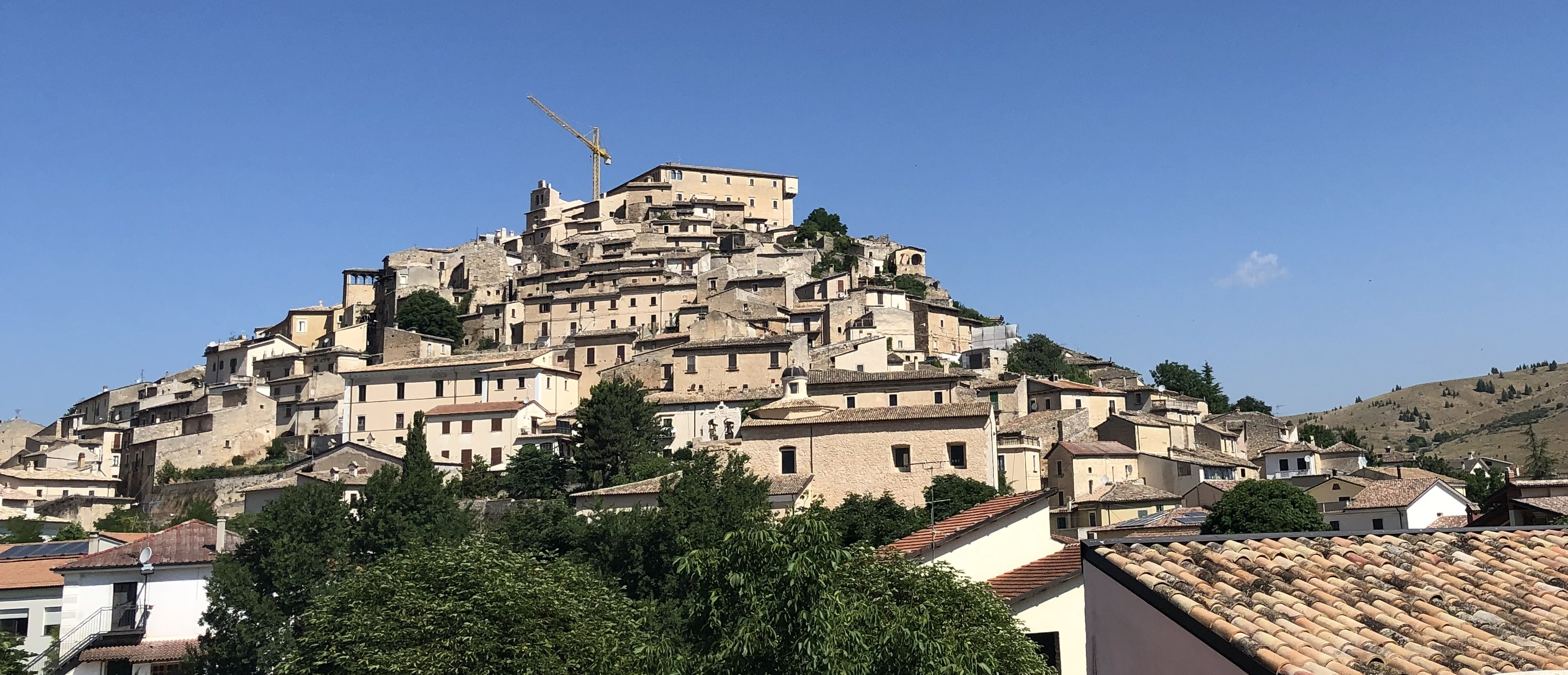 Navelli Italy